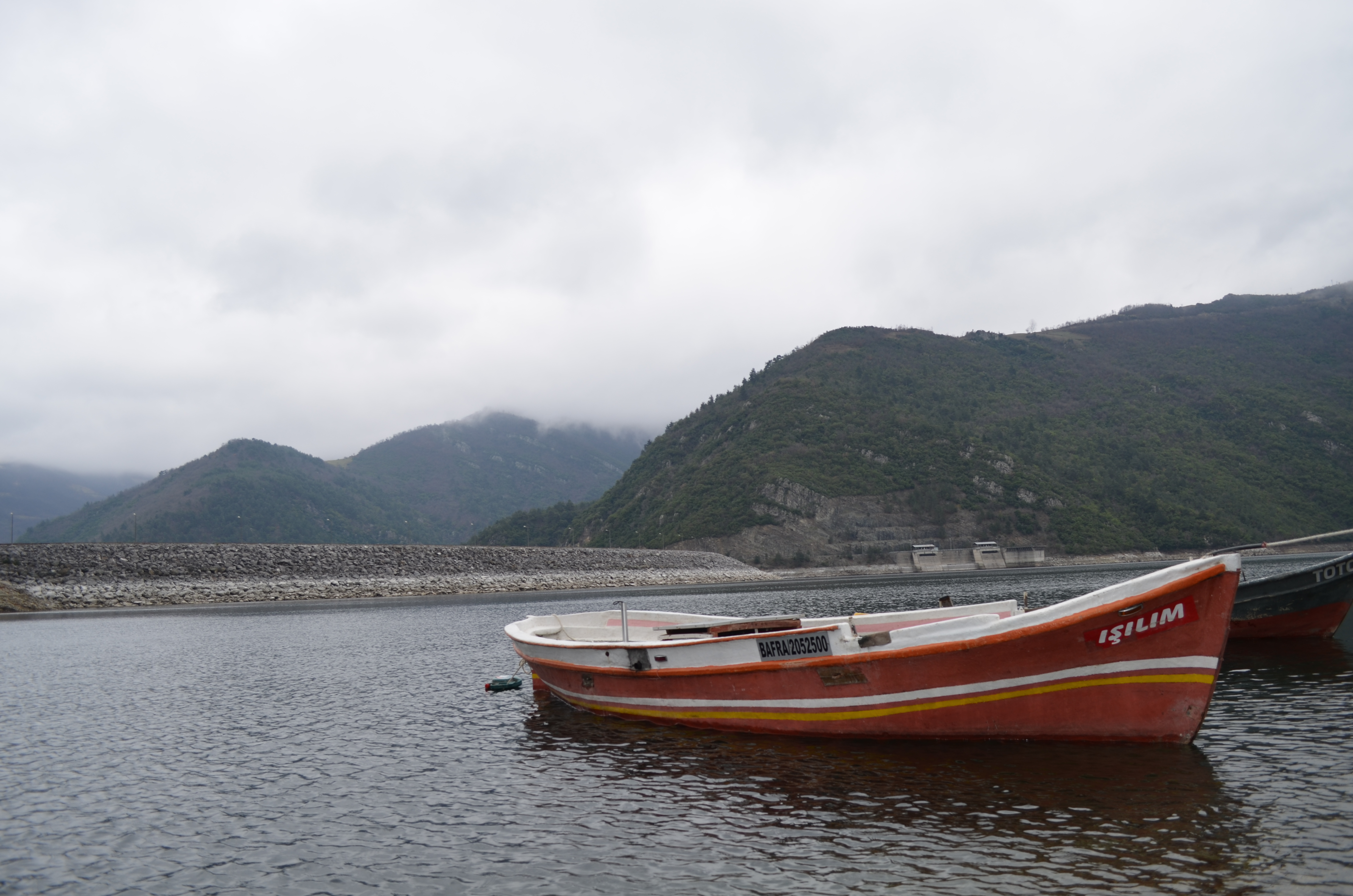 Altınkaya Barajı